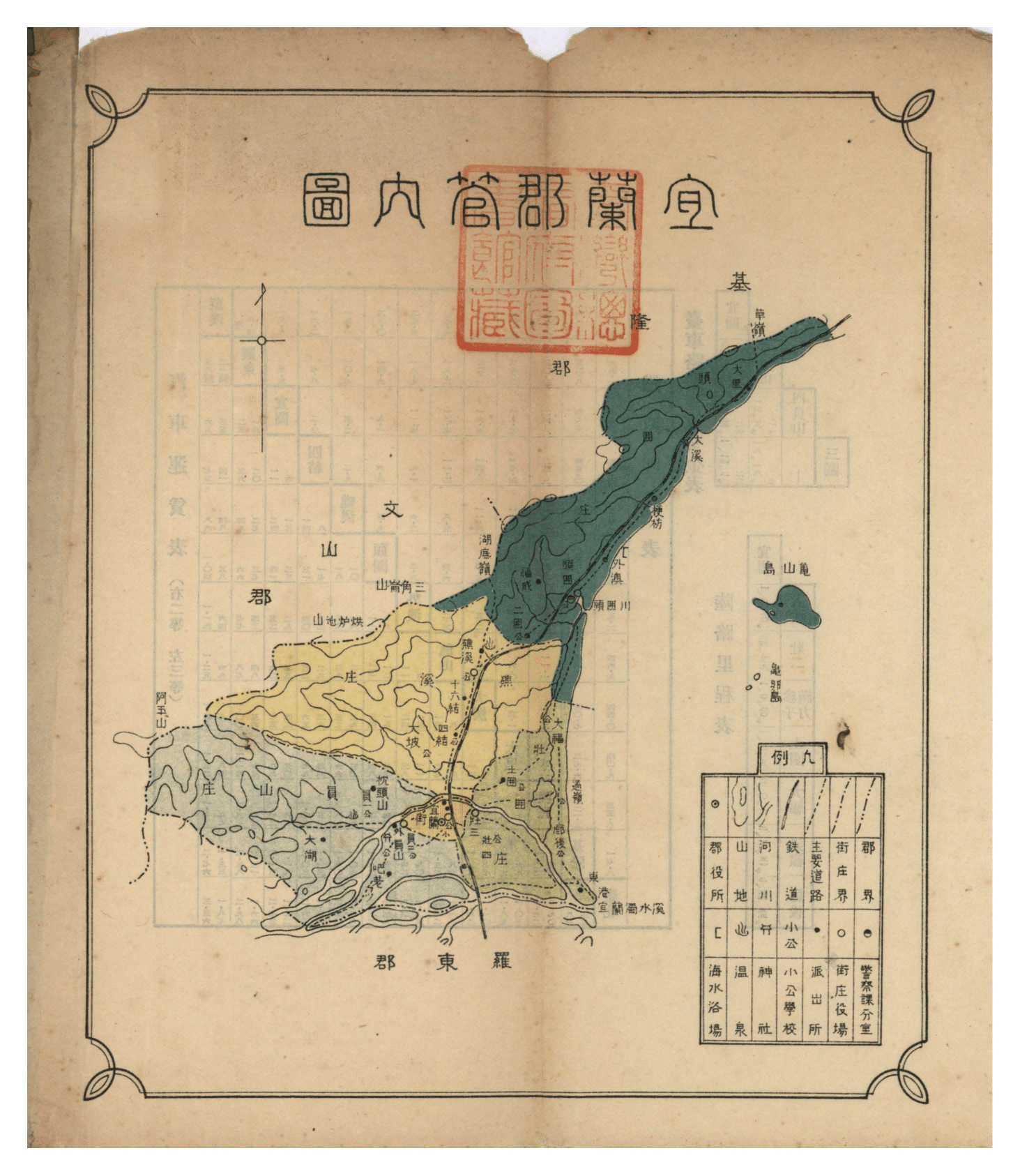 宜蘭郡管內圖，1931年2月4日